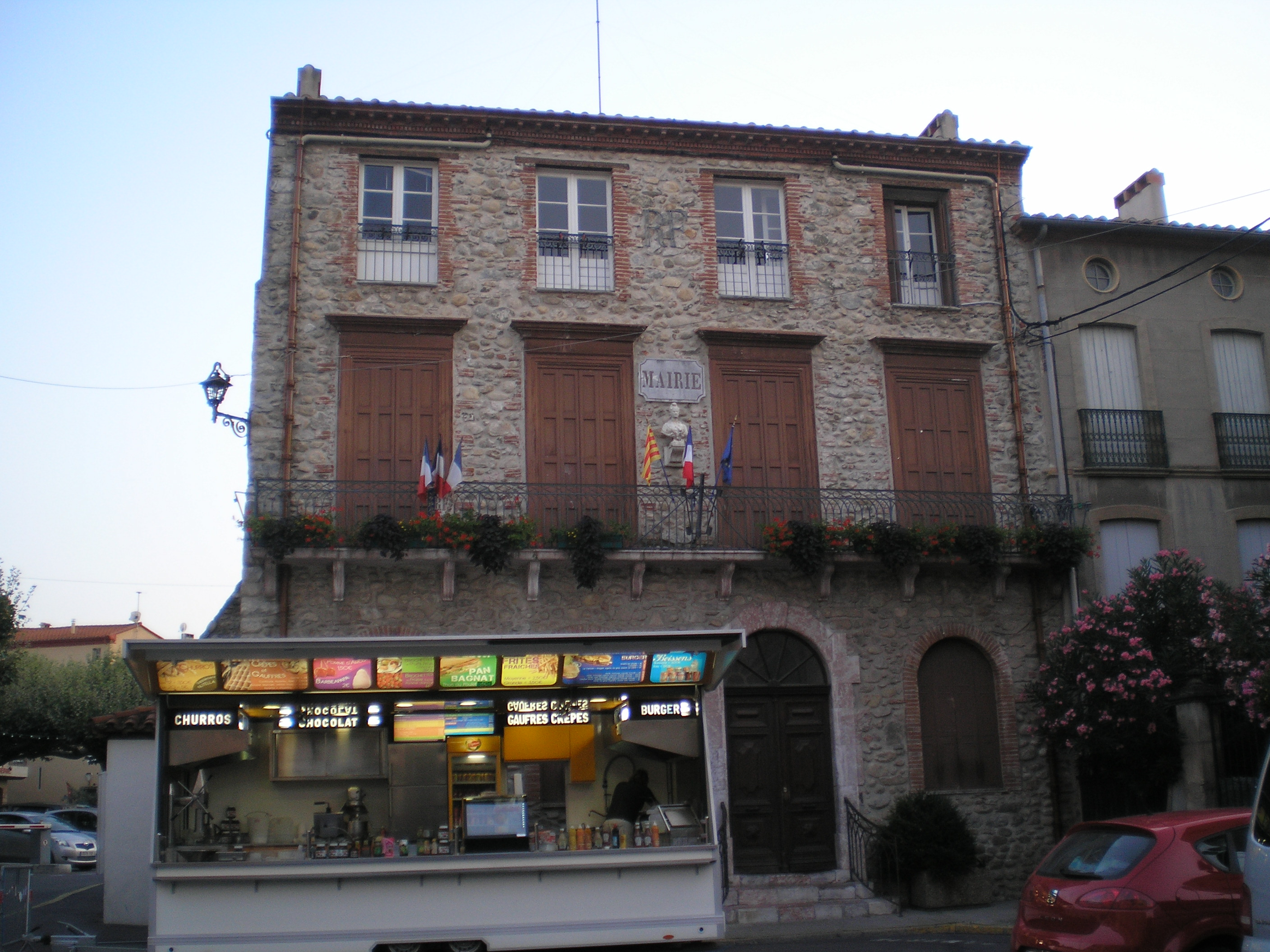 Casa de la vila de Prada (el Conflent)